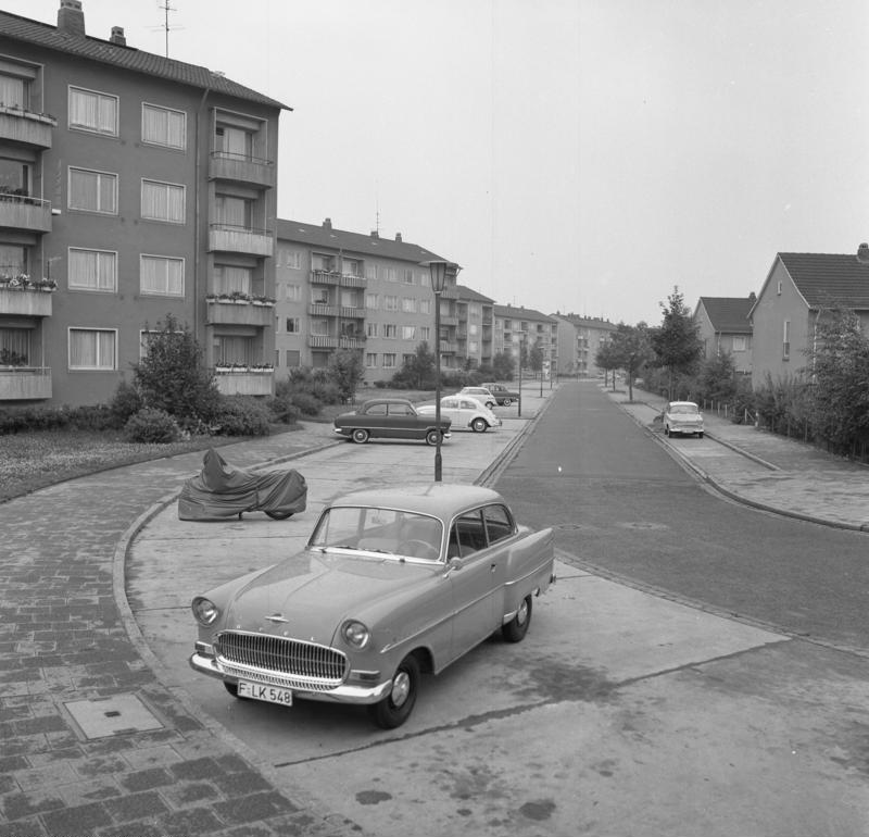 Wohnungsbau: Frankfurt/Main, Albert Schweitzer-Siedlung 17. - 20. Juli 1961